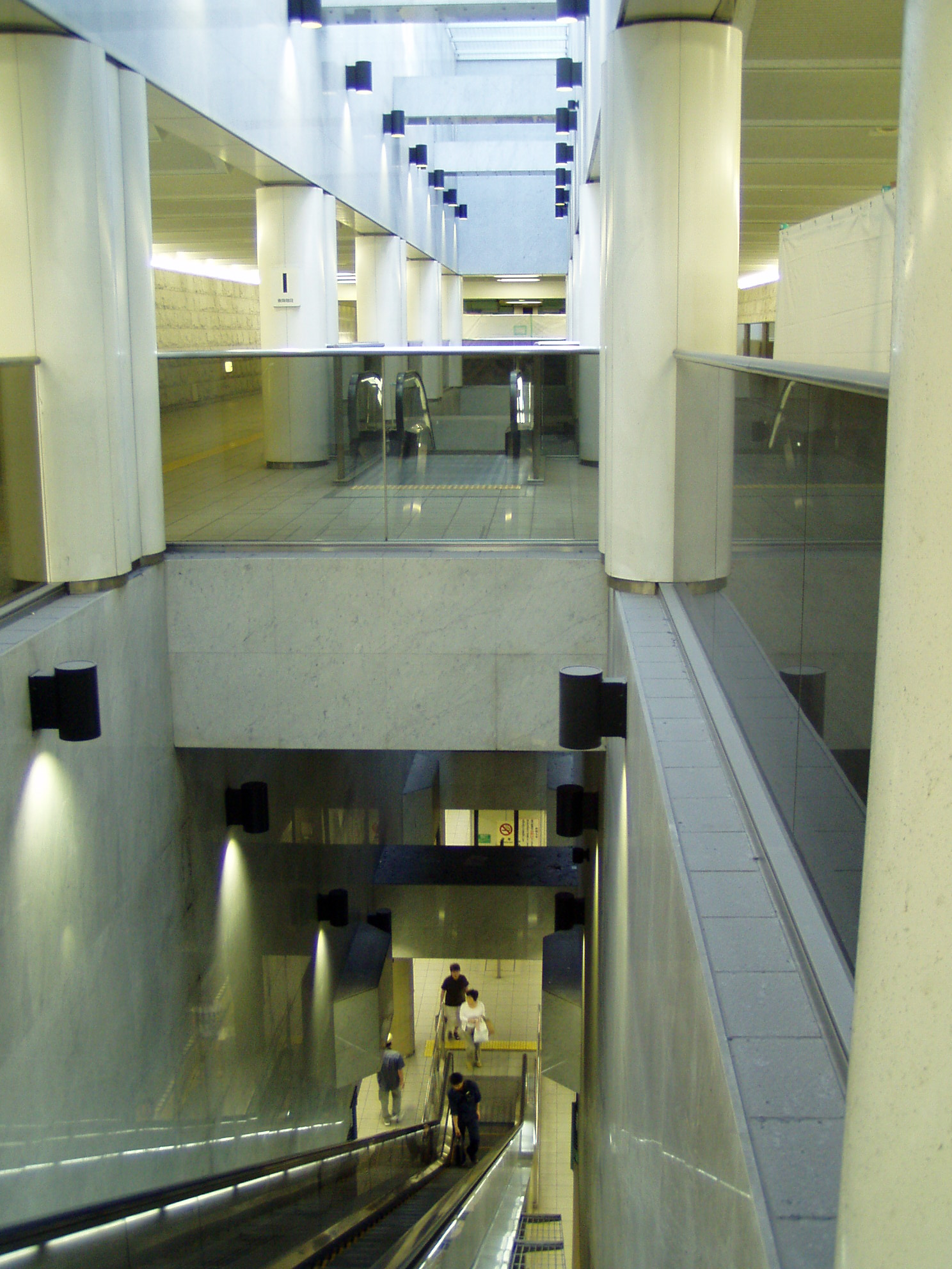 Osaka. Metro 7 Morinomiya Station.